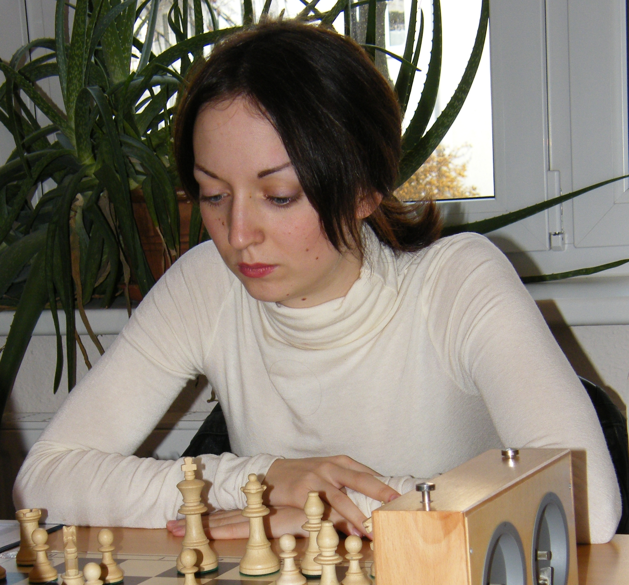 Elisabeth Pähtz bei einem Wettkampf der Frauenbundesliga in Berlin-Pankow